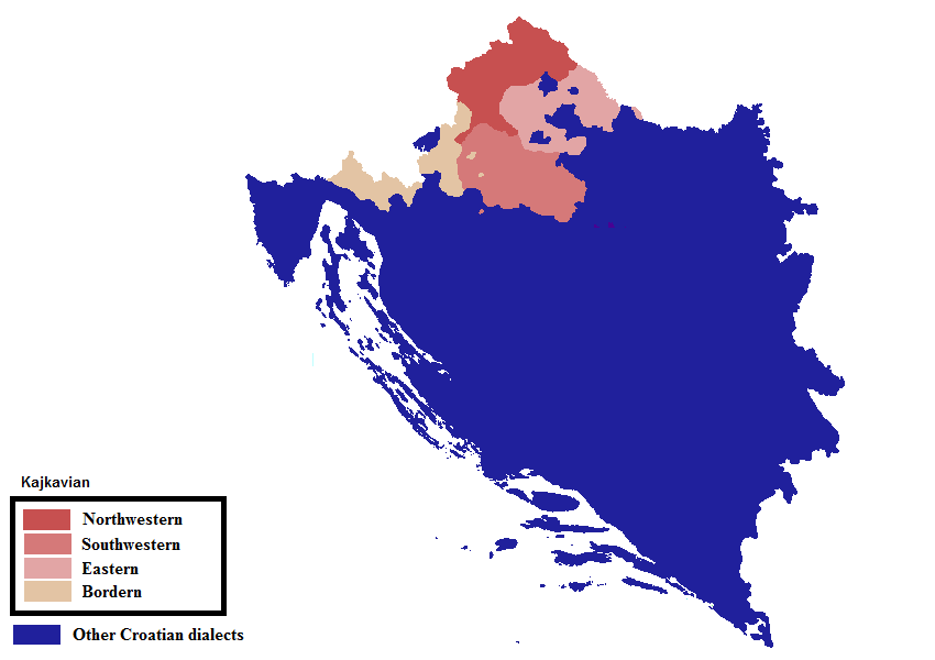 Kajkavski dijalekti, goranski, prigorski i južnosutlanski su objedinjeni u granične